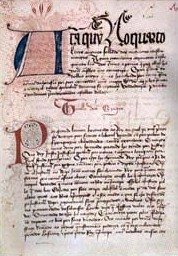 Página decorada das Ordenações Afonsinas, uma compilação legal da história do Direito de Portugal